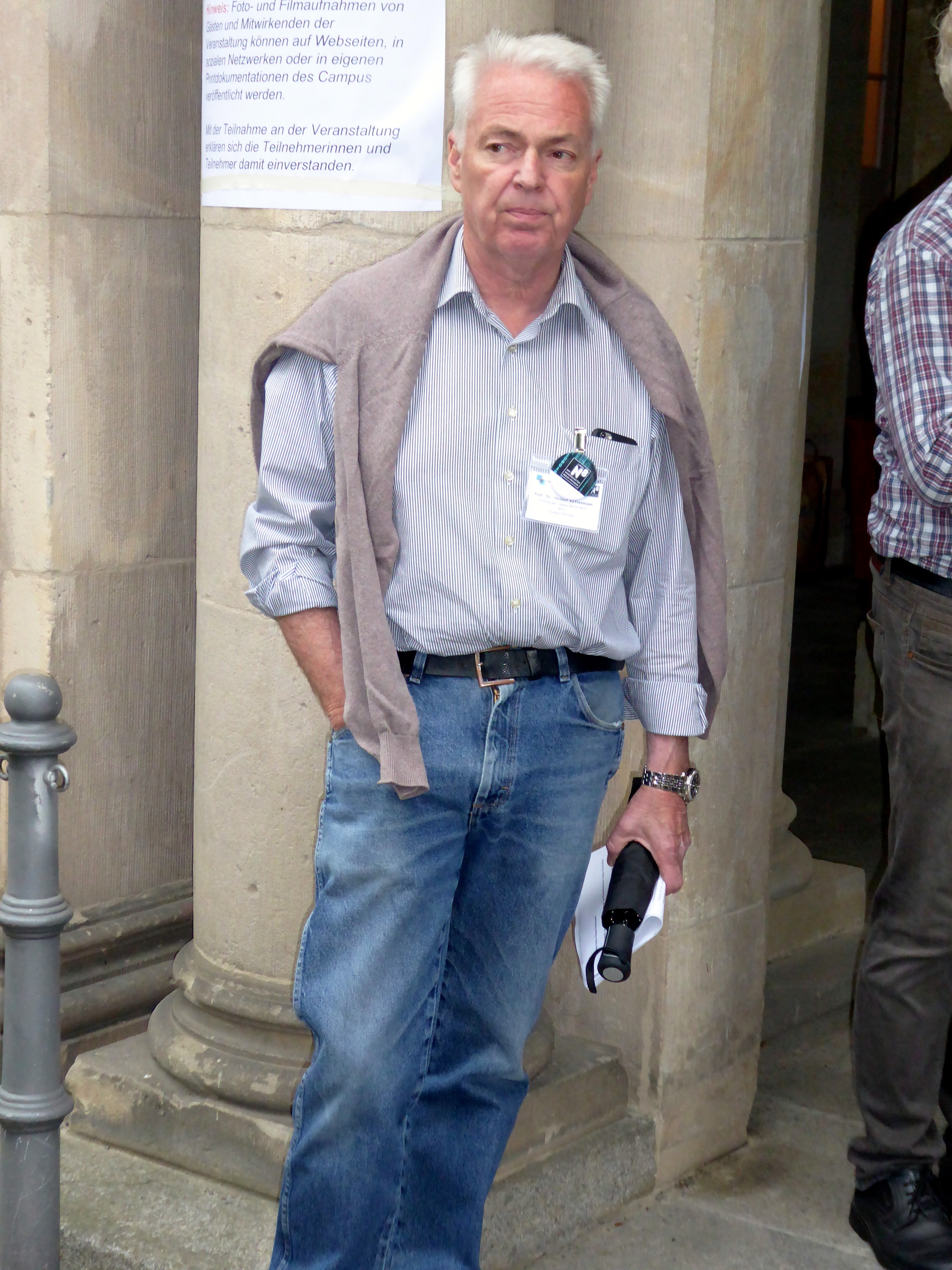 Prof. Helmut Kettenmann